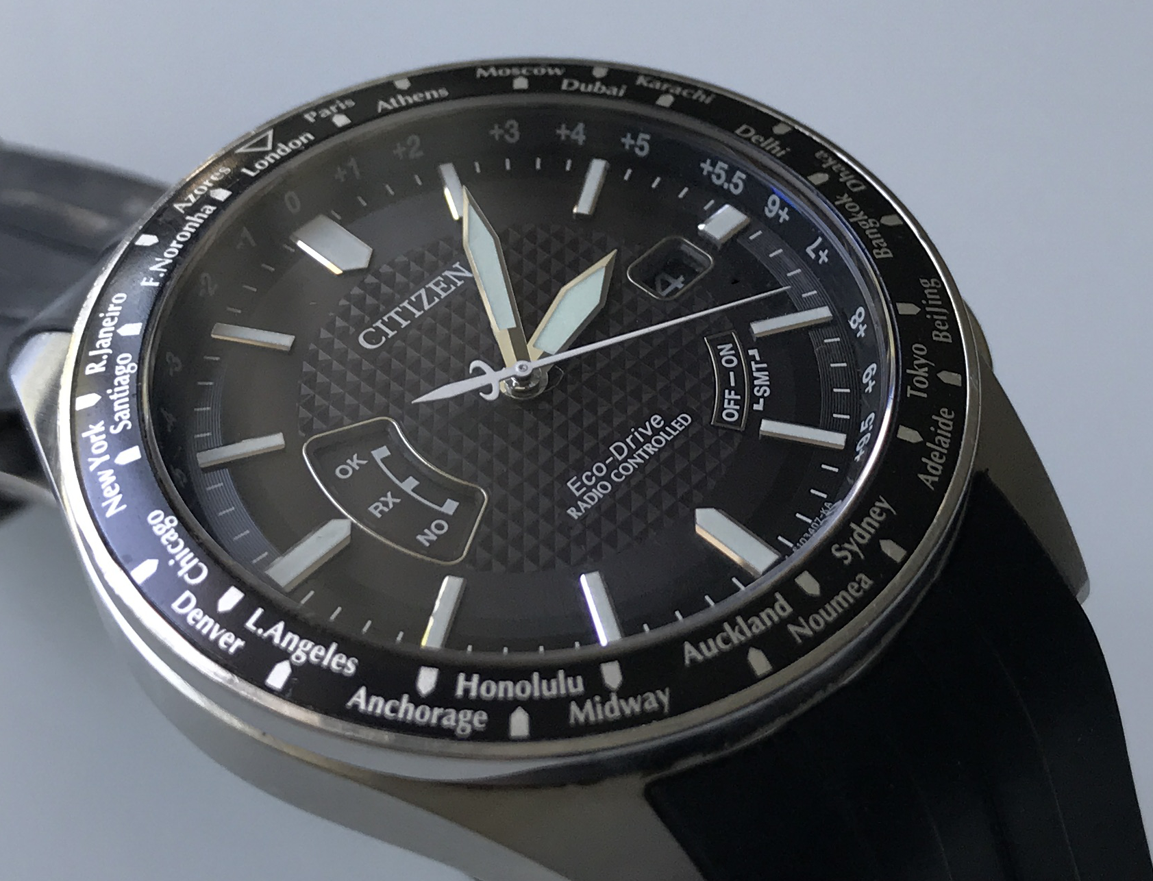 Modell Citizen CB0021-06E, H144